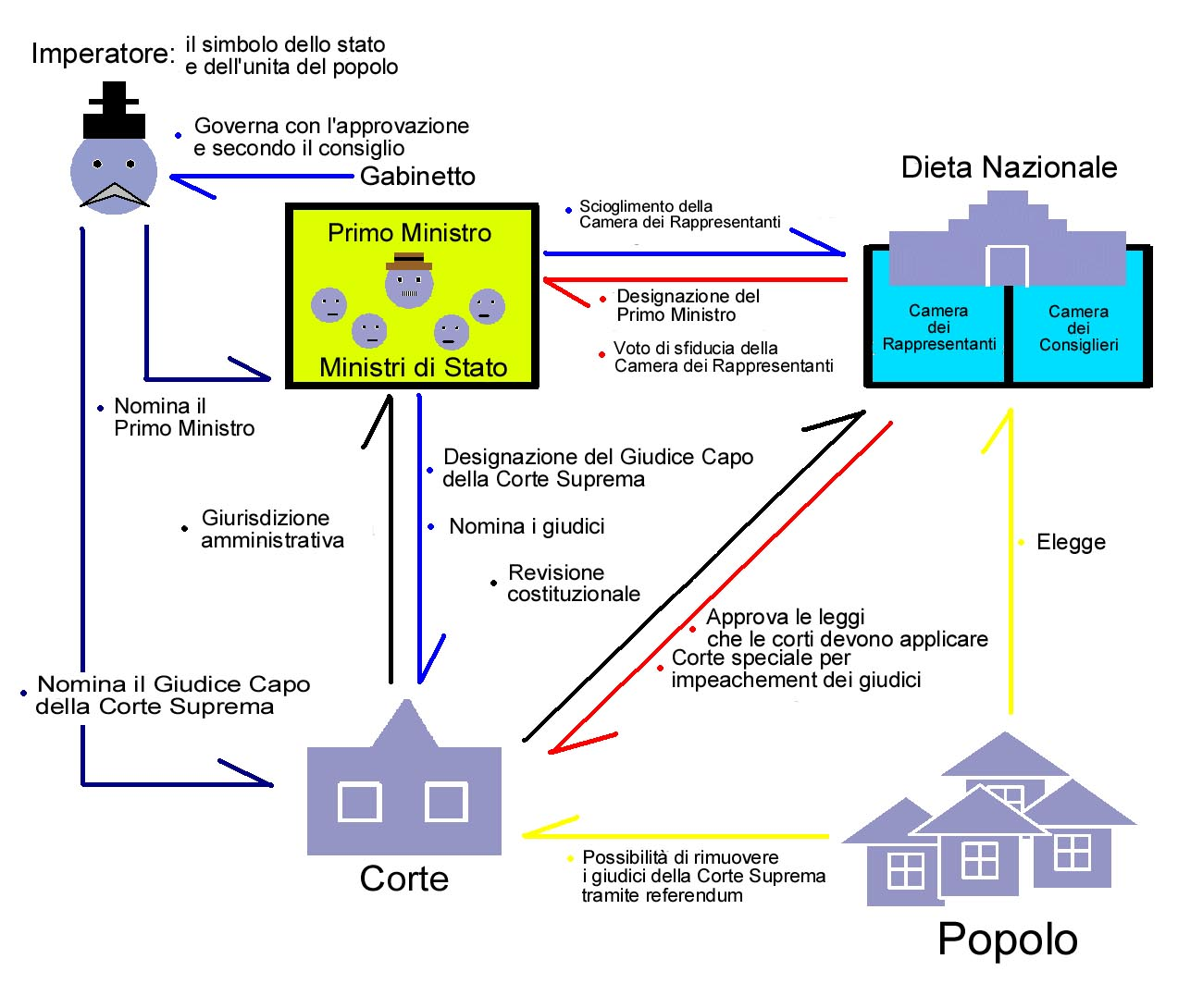 Schema rappresentante il sistema costituzionale del Giappone